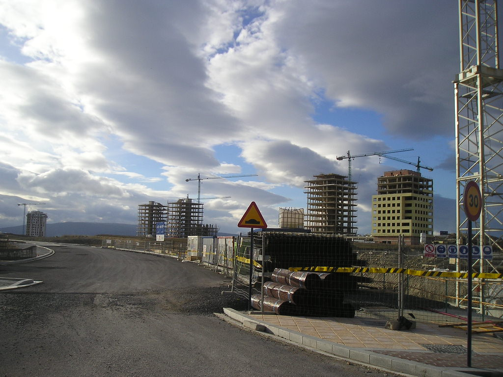 Zabalgana eraikitzen.